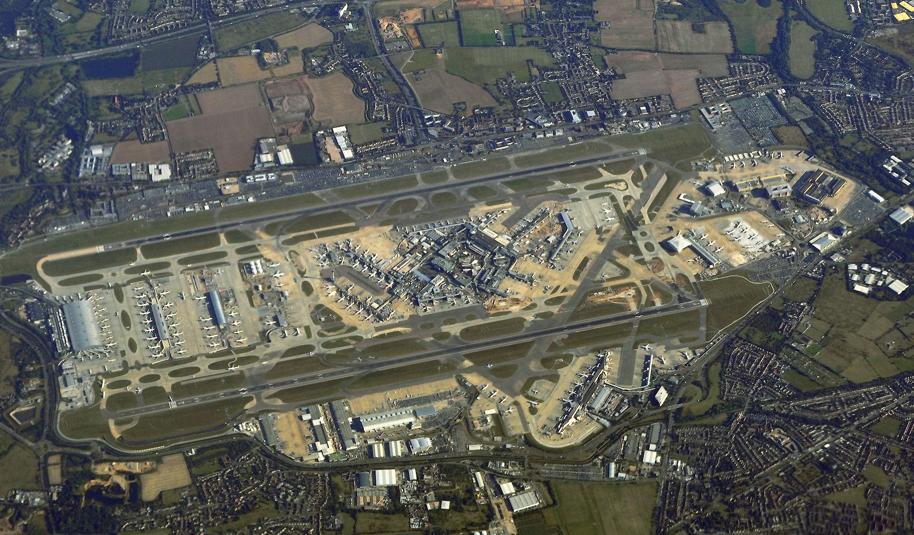 MSN 33643 B737-8AS RYANAIR LONDON FLIGHT BVA-DUB